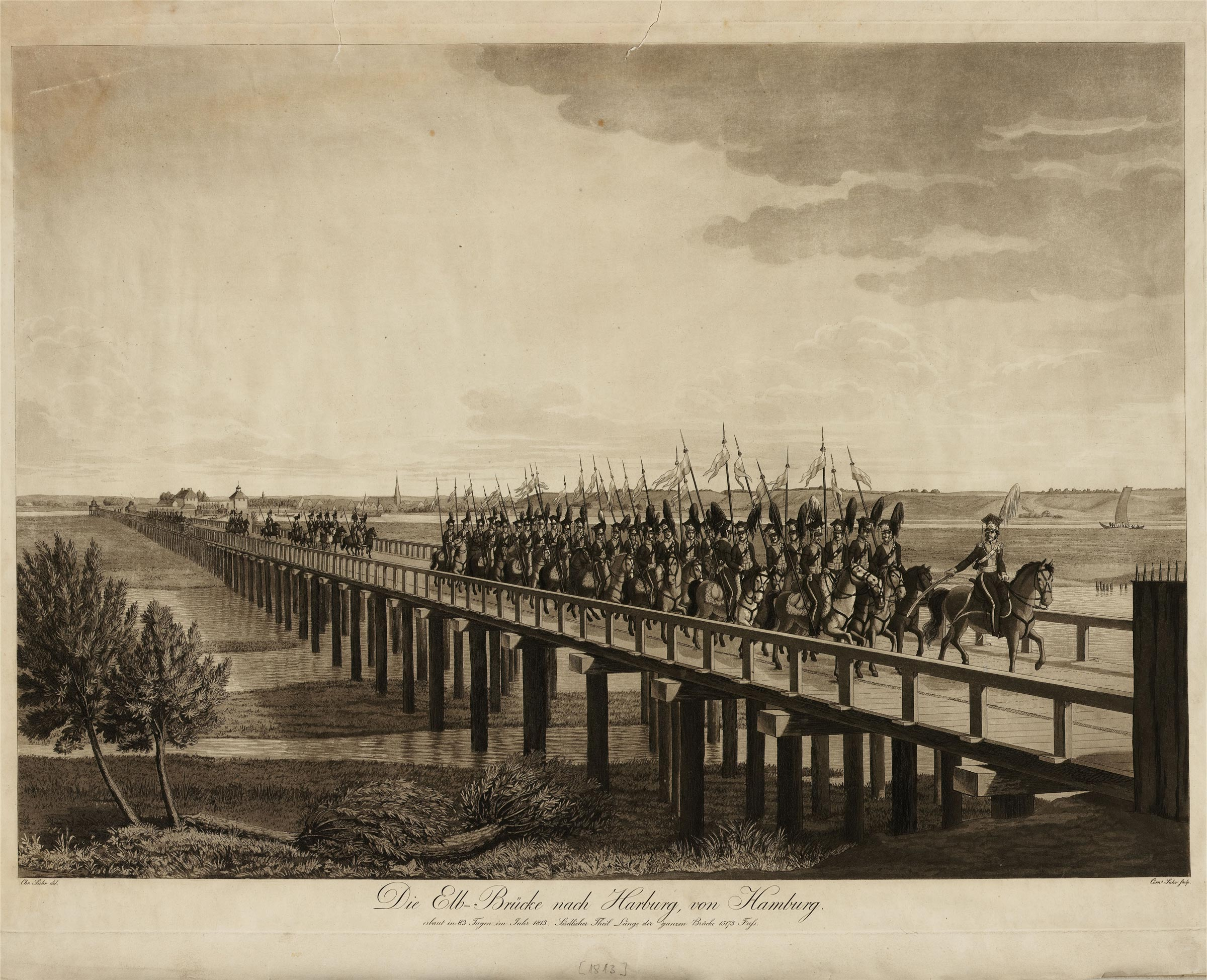 Die Elb-Brücke nach Harburg von Hamburg, Stahlstich von Christoffer Suhr